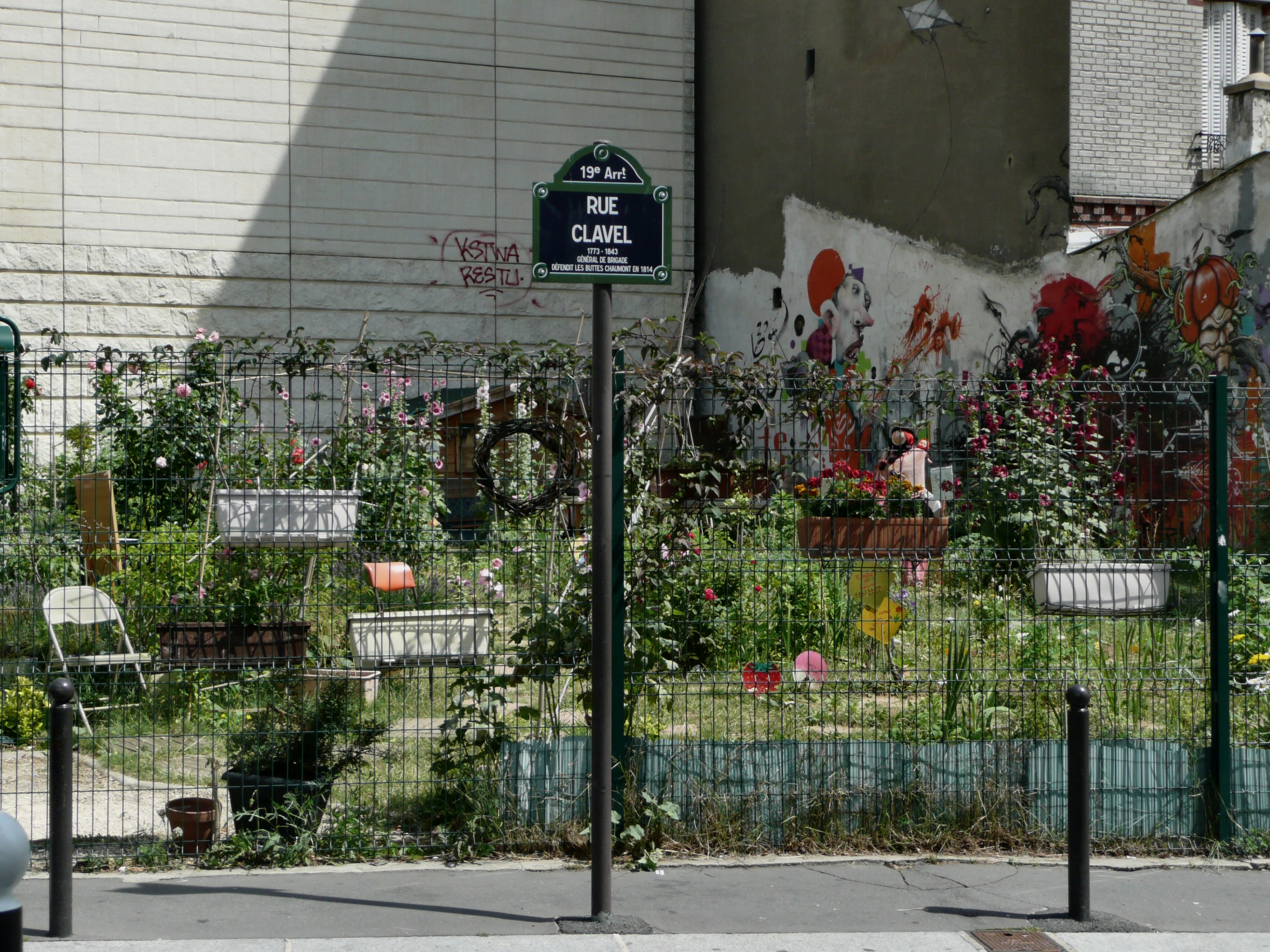 Plaque de la rue Clavel, dans le 19e arrondissement de Paris, en mémoire de Pierre Clavel, général français (1773-1843)